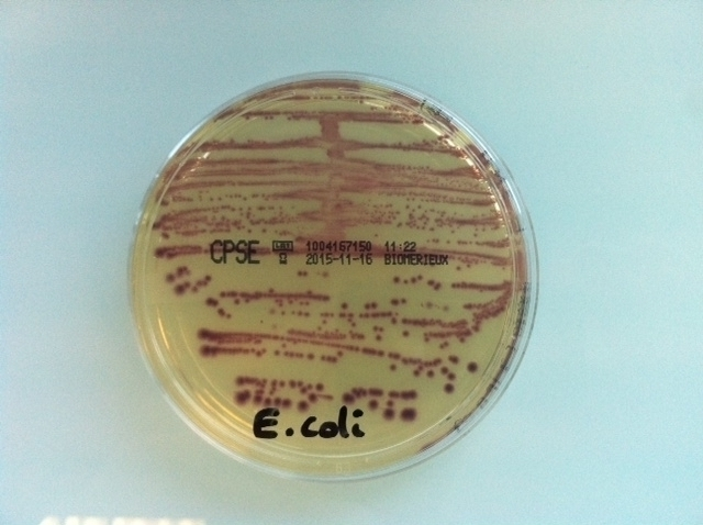 culture d'E.coli sur CPSE